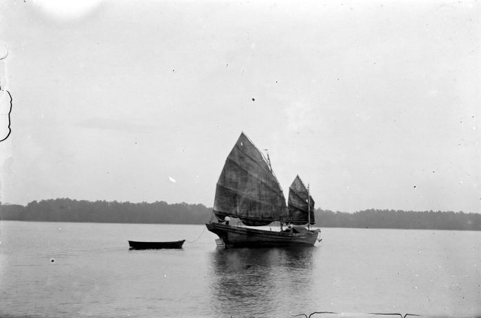 Negatief. Een Chinese jonk zeilt op de Tembesi-rivier in Djambi, Sumatra